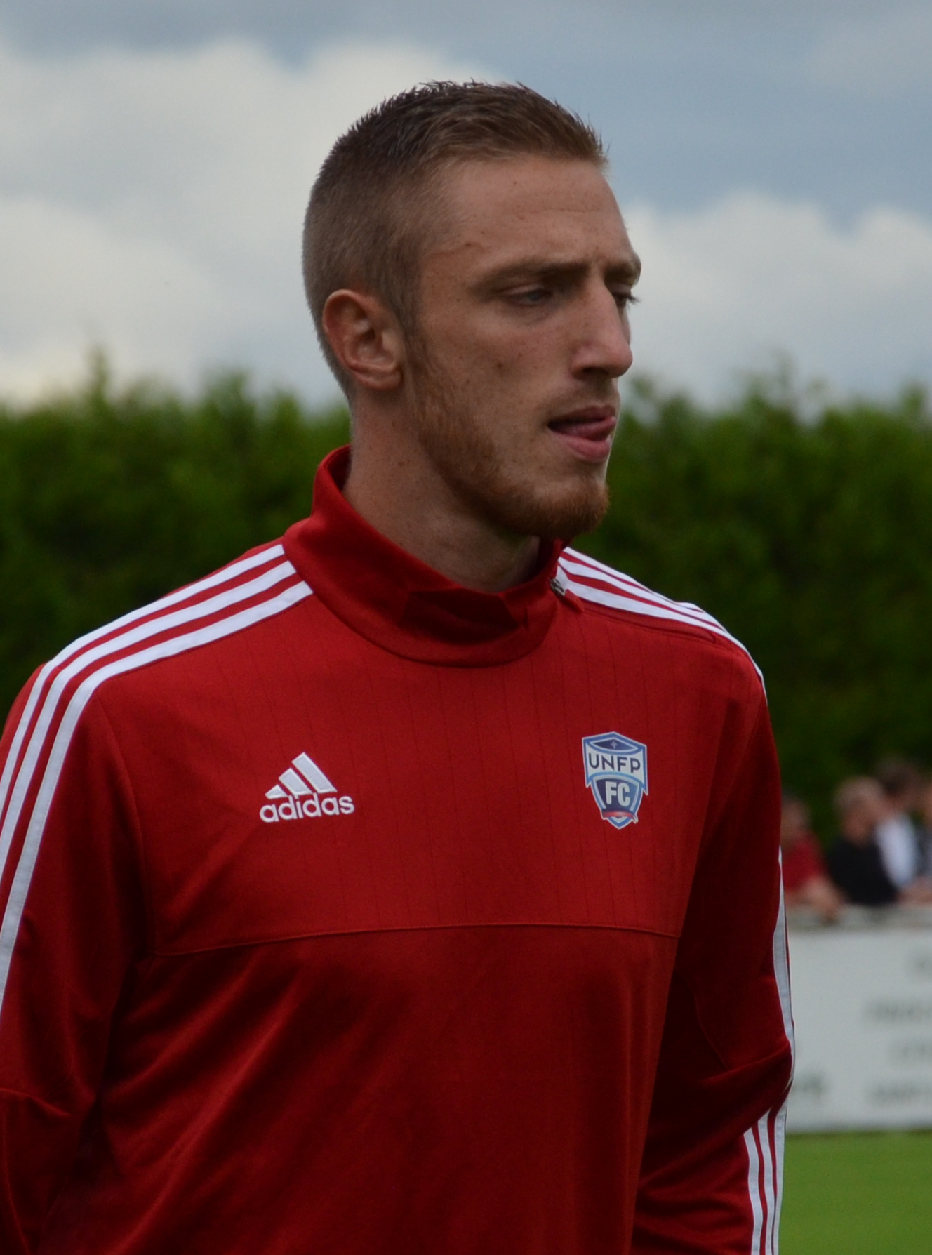 Photographie prise lors du match opposant le SM Caen à l'UNFP en match amical au stade Louis-Villemer de Saint-Lô le 30 juillet 2016. Ici, Jérémy Obin.